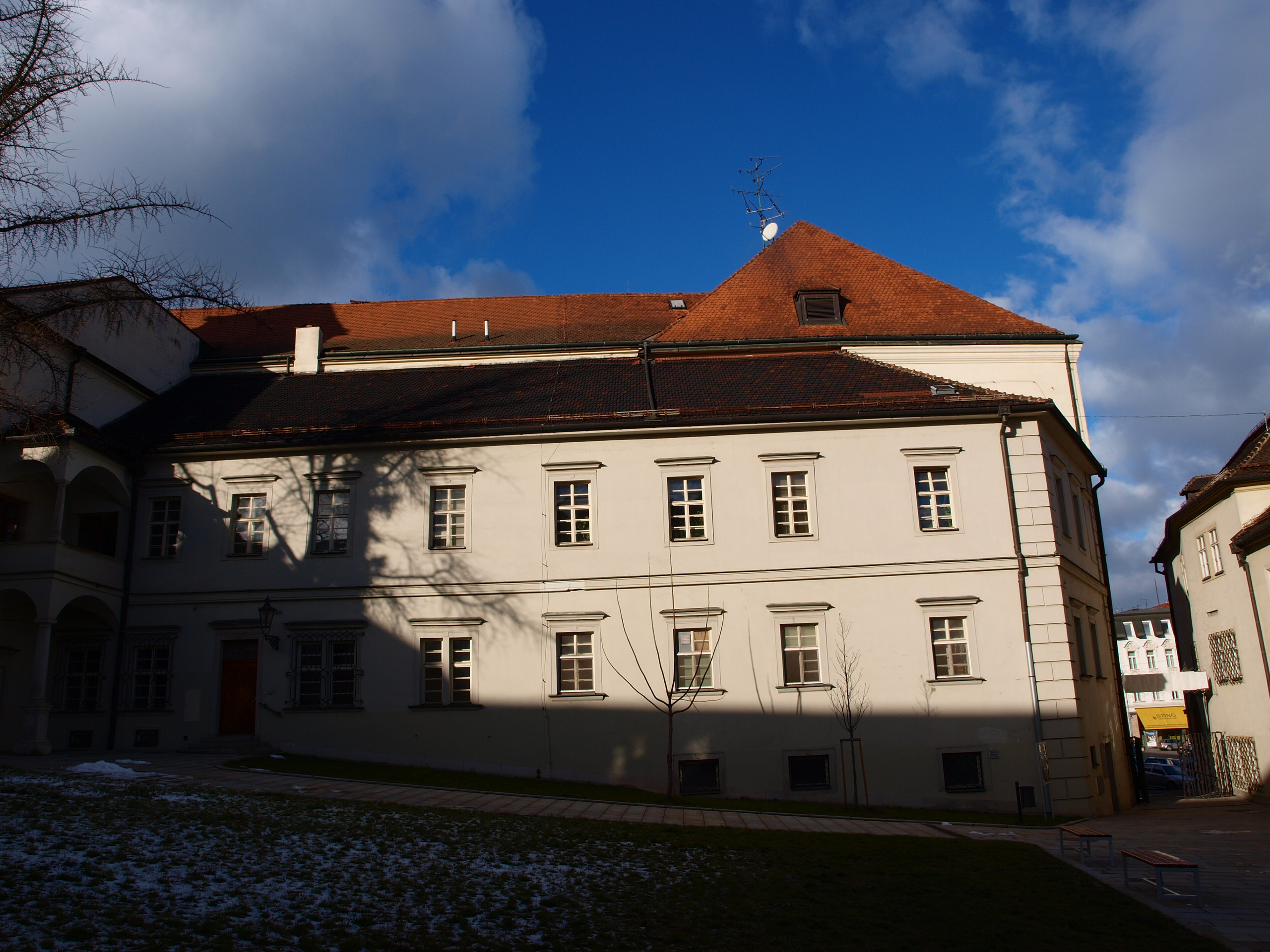 Biskupský dvůr (Brno)